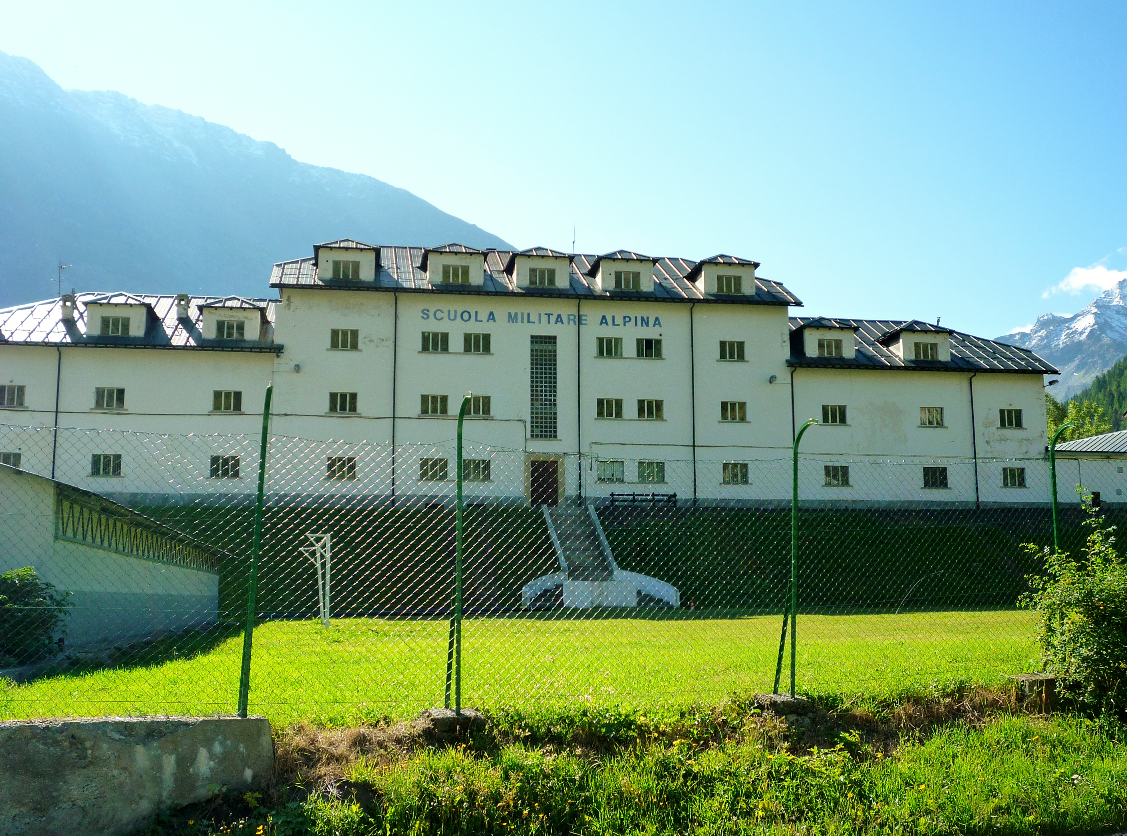 Caserma Monte Bianco della Scuola militare alpina, a La Thuile, Valle d'Aosta, Italia.